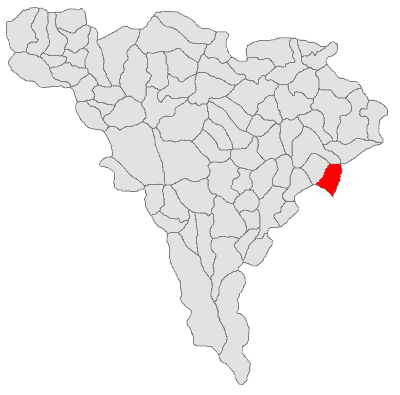 Categorie:Hărţi ale judeţului Alba